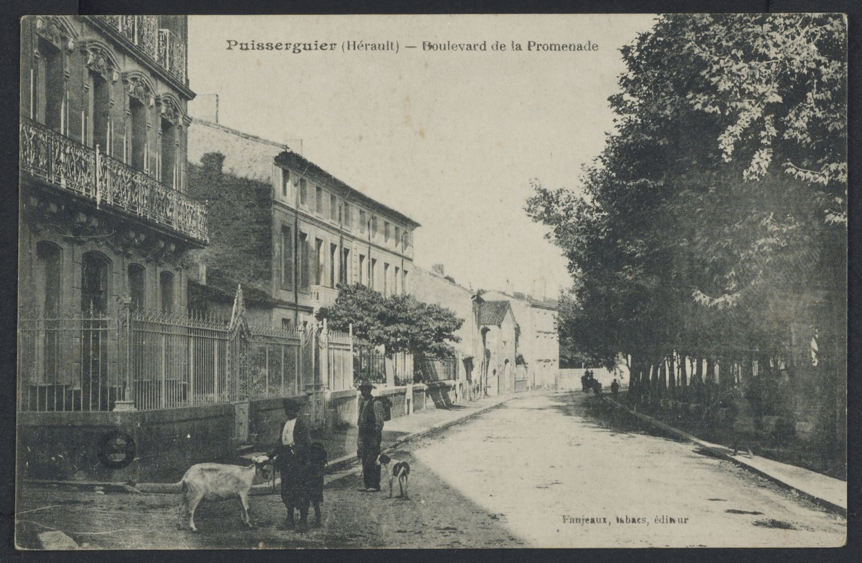 Puisserguier. - Boulevard de la Promenade : carte postale (1ère moitié du XXe siècle)